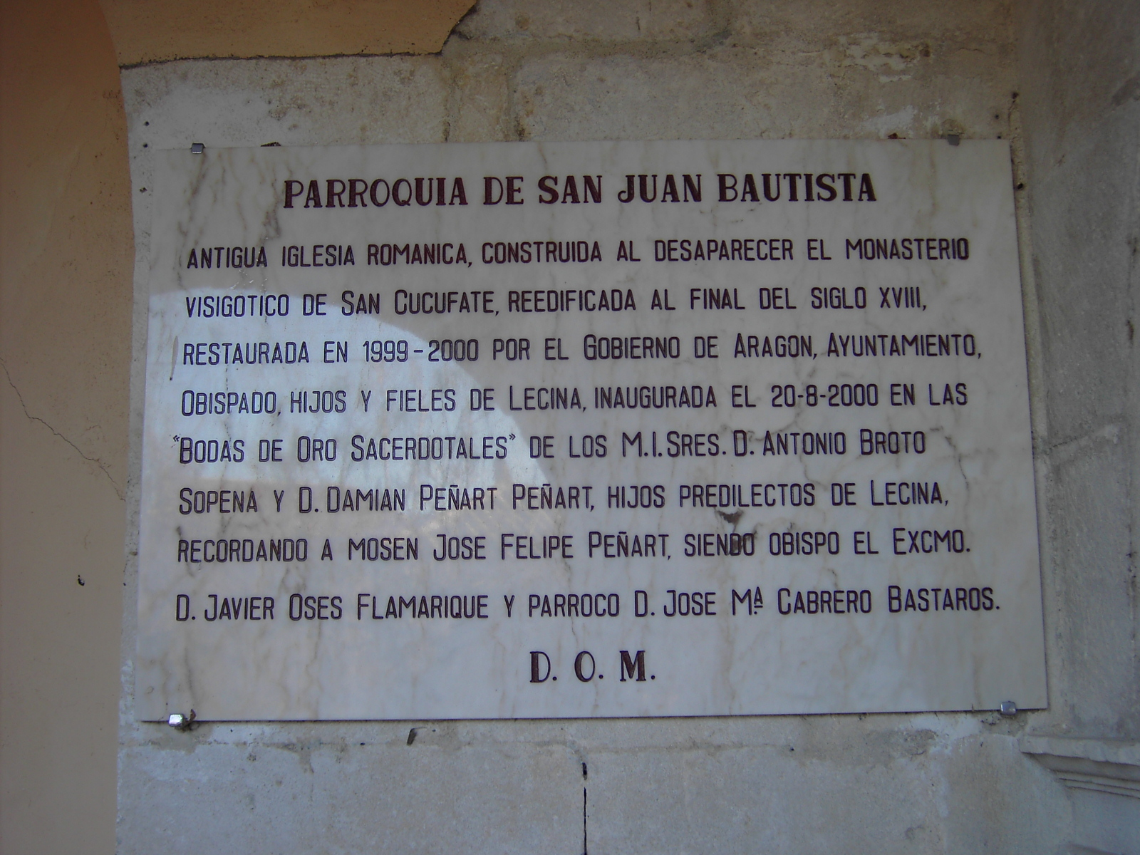 Placa conmemorativa de la iglesia de San Juan Bautista, en Lecina.